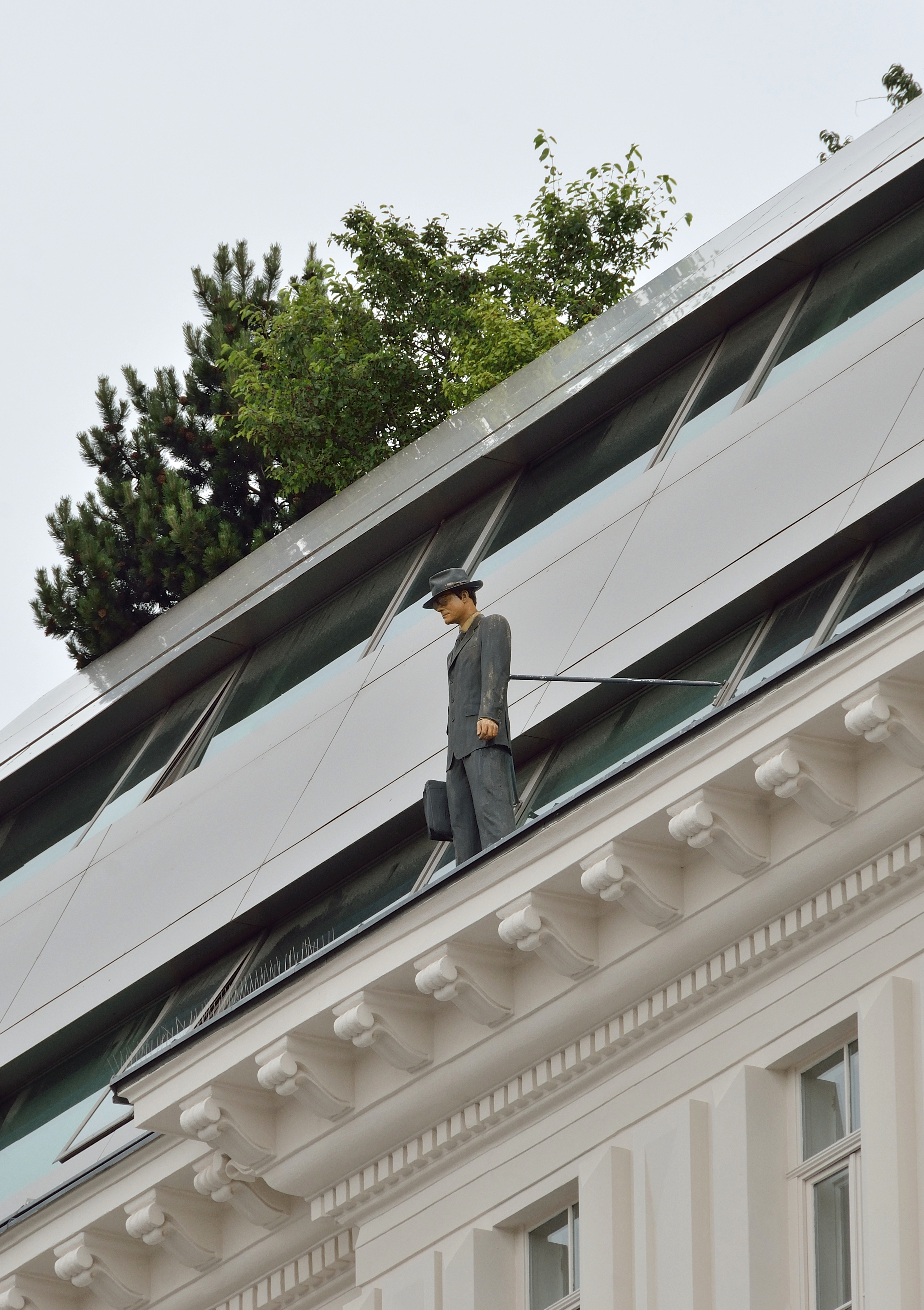 Reason to Believe von Ronald Kodritsch am Dach des Gebäudes Getreidemarkt 17 in Wien Mariahilf. "Der Titel Reason to Believe hat mit Fragen zu tun. Das In-Frage-Stellen des Kapitalismus, der Ausbeutung – auch der Selbstausbeutung – führt zu einer Selbstreflexion auf einem Dachsims. Die Wirtschaftskrise wird aus einer neuen Perspektive quasi von oben betrachtet. Können uns Philosophie, Religion oder ein Lied noch retten? Wohin komme ich, wenn ich einen Schritt weiter gehe, erreiche ich dann mein Ziel? Gibt es eine Gefahr? Kann ich mich getrost fallen lassen, und will ich das überhaupt?" (lt. Kör-Website)